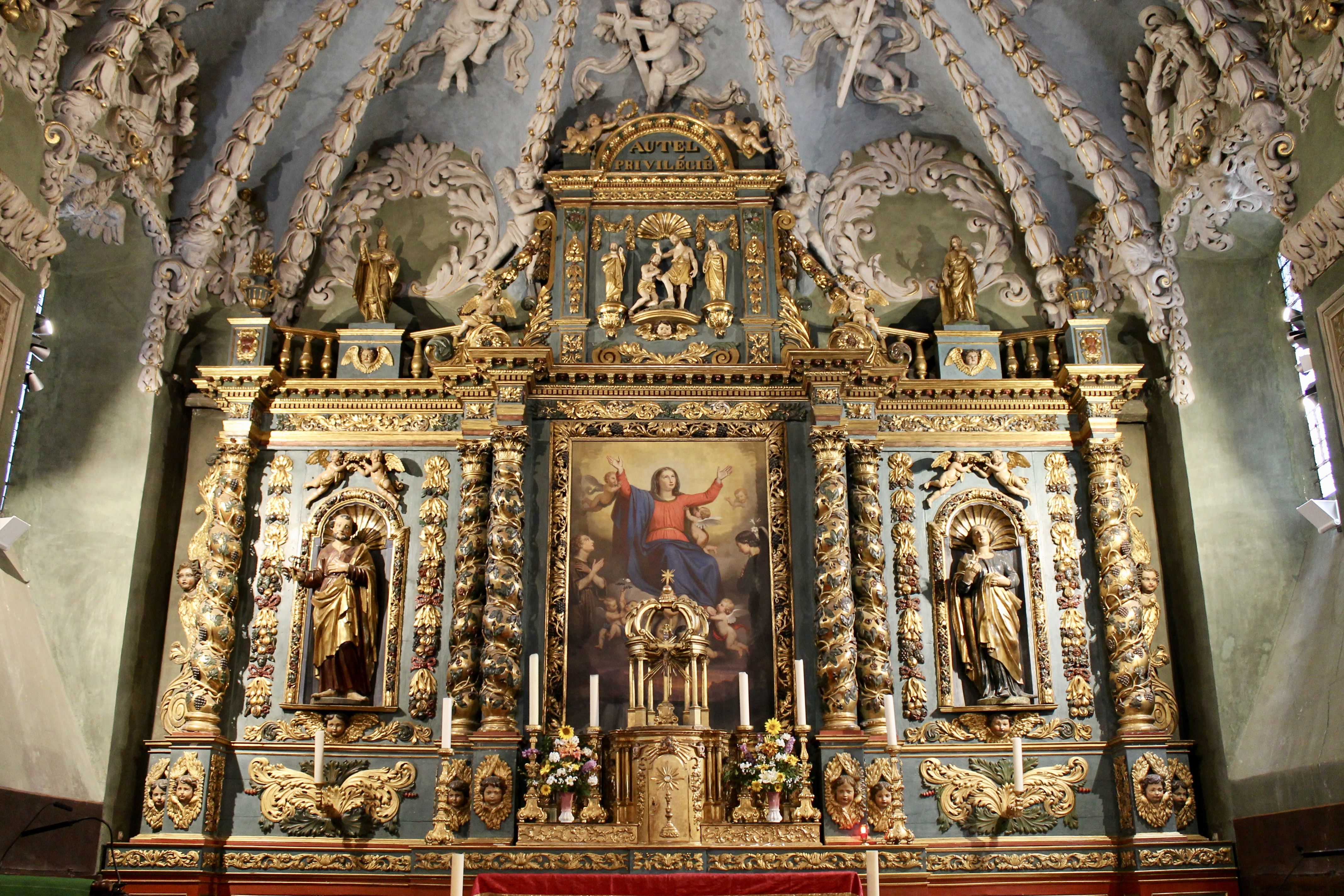 Retable du maître autel de l'église de l'Assomption de Valloire (août 2018).